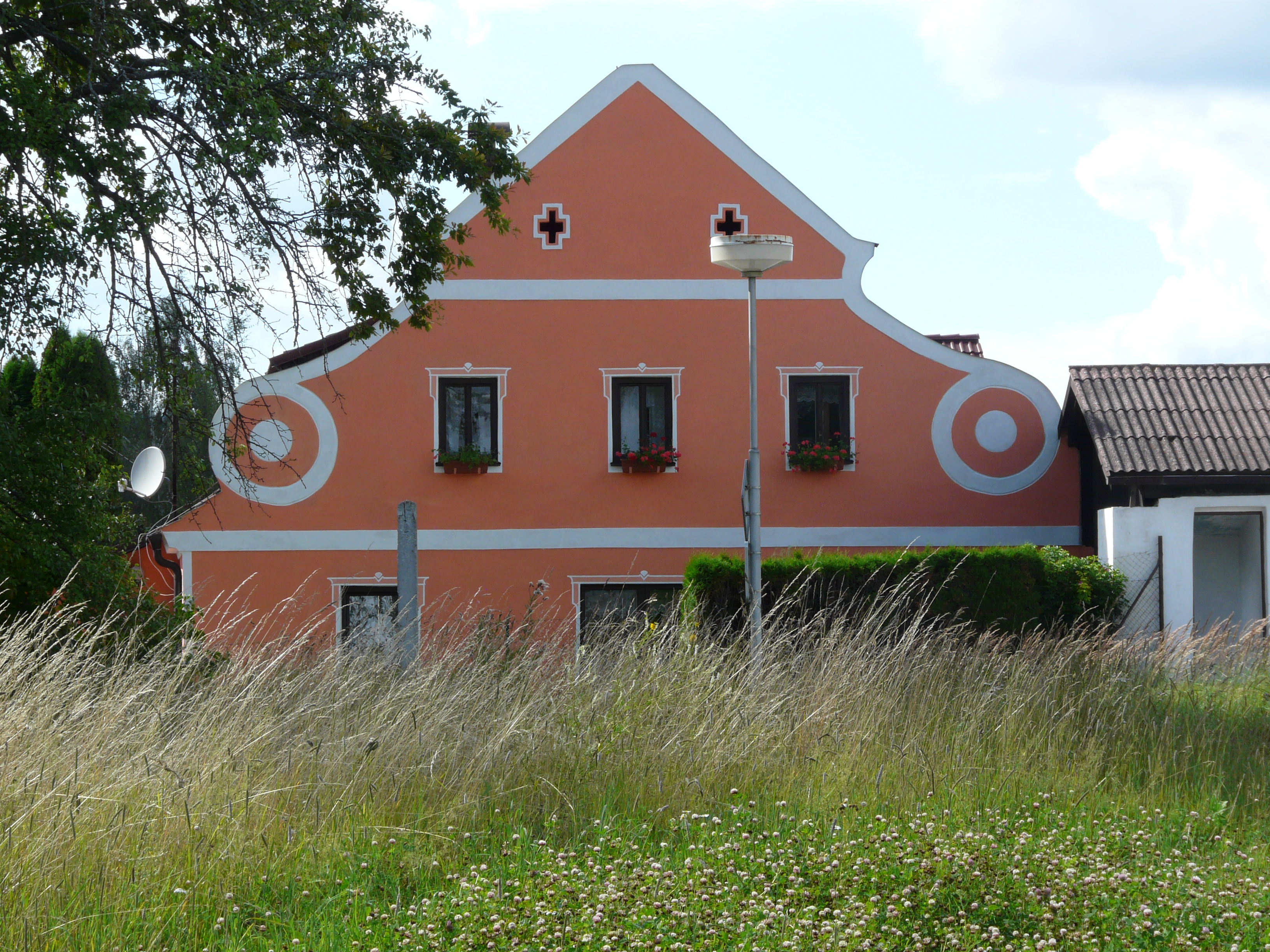 Dům v obci, čp. 1., je typickou ukázkou selského baroka. Jedná se o nejjižnější výskyt této architektury v České republice.